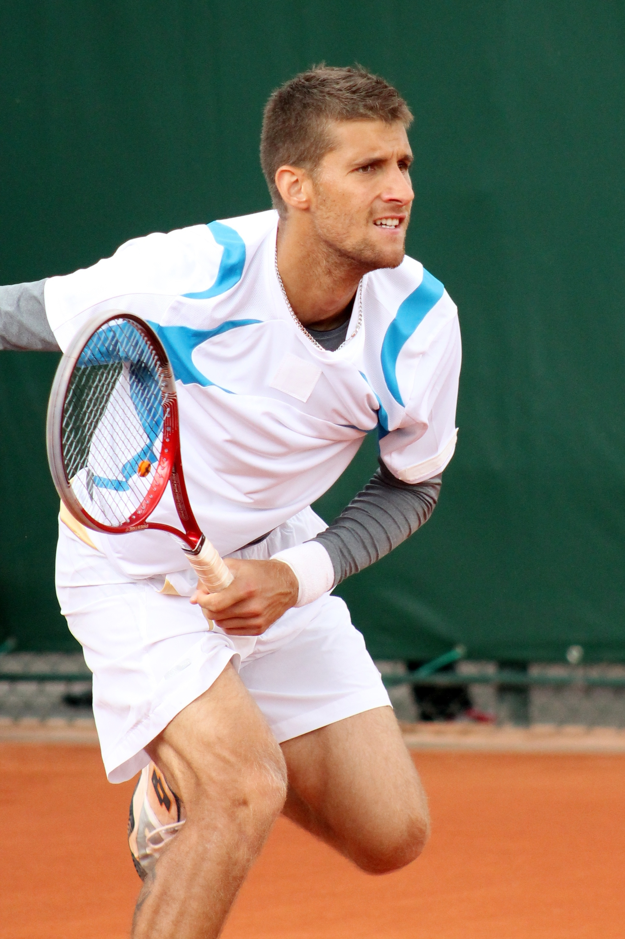 Klizan RG13 (3)